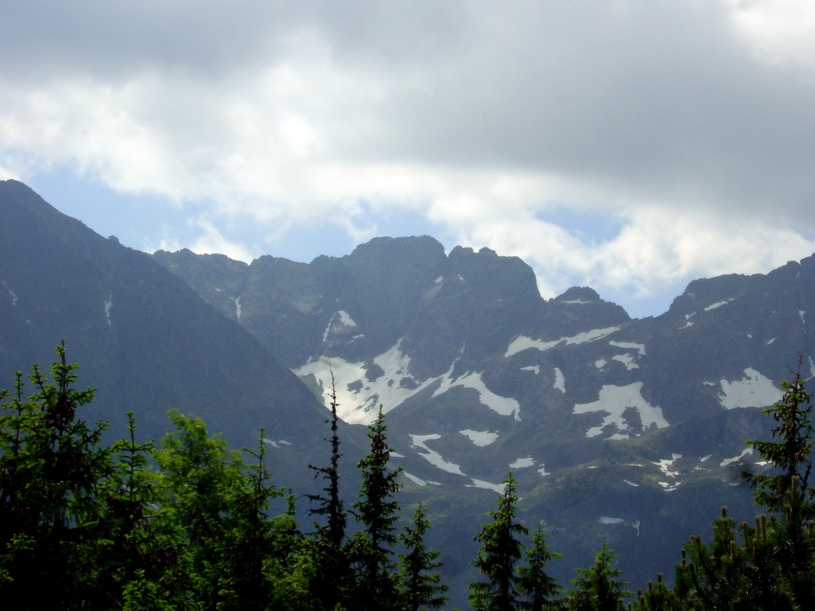 Kozi Wierch z okolic schroniska Murowaniec